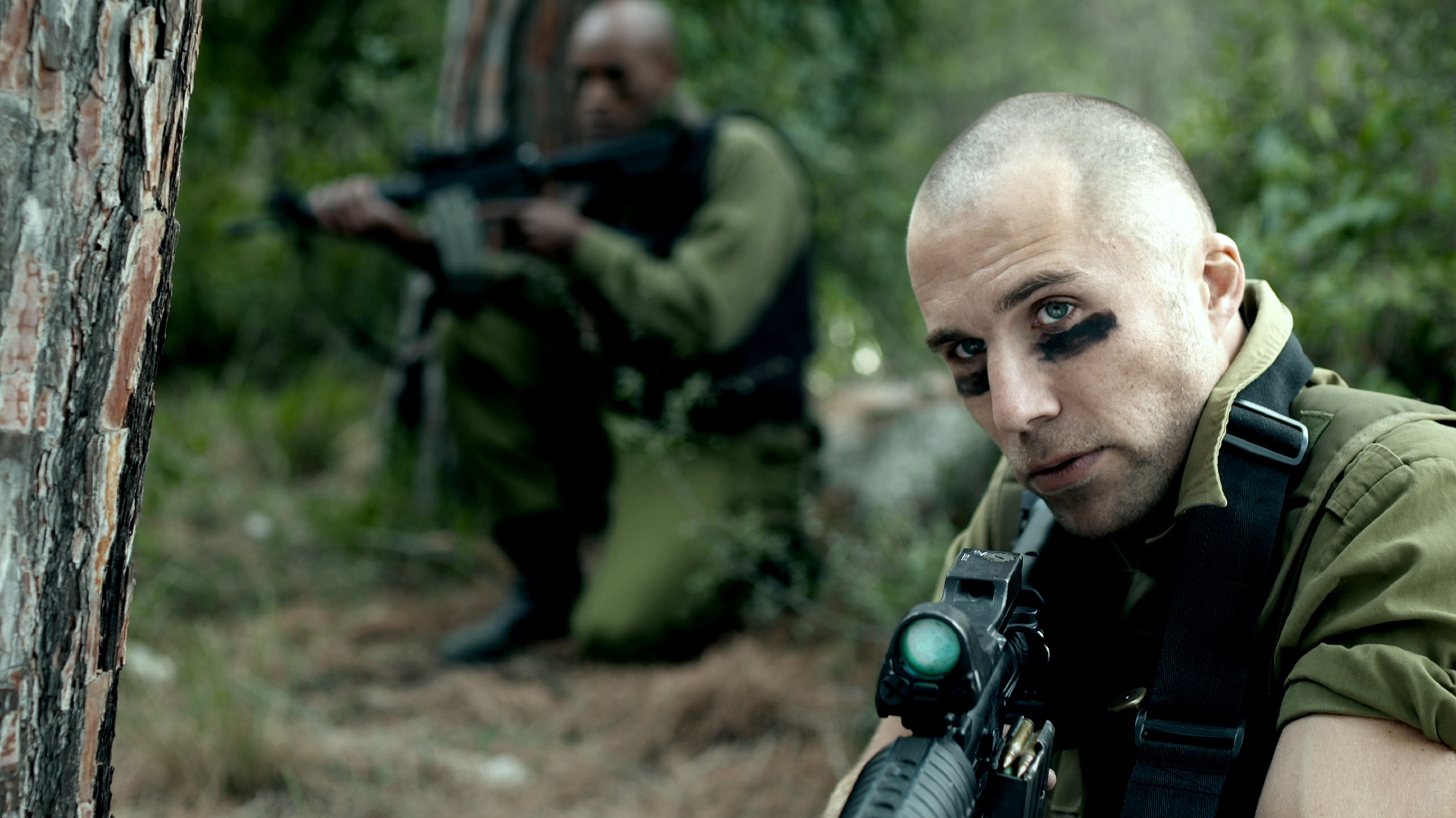 רוי מילר בסרט הקולנוע בשר תותחים